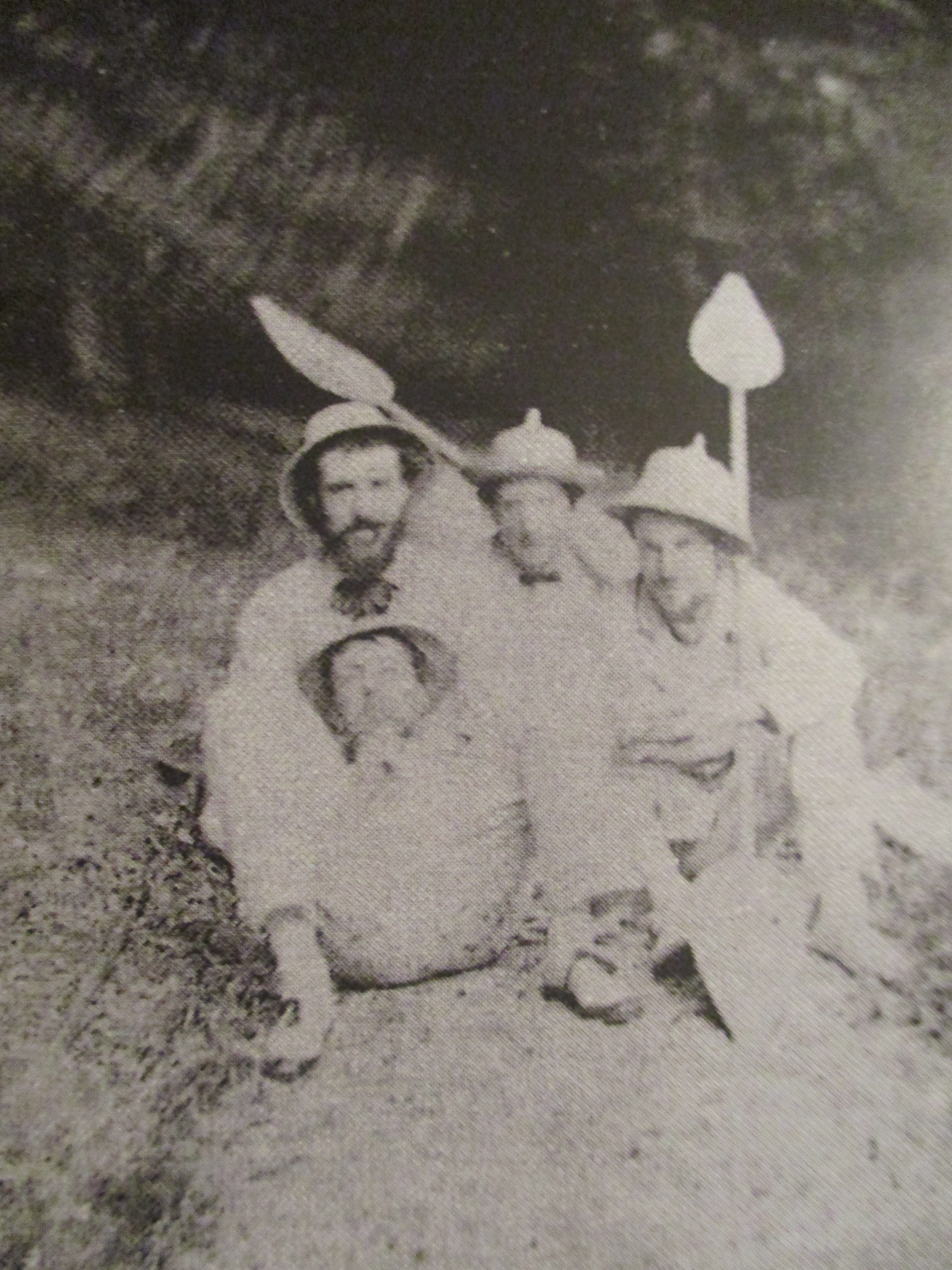 Anonyme: Caillebotte (à dr.) et des amis canotiers (1877 ou 1878), coll. part.